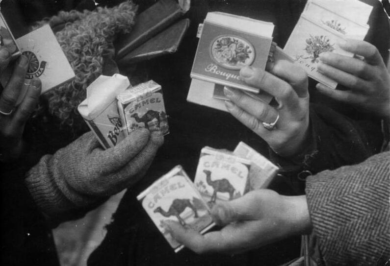 Illus-ADN 20.1.1949 Schwarzhandel am Potsdamer Platz in Berlin